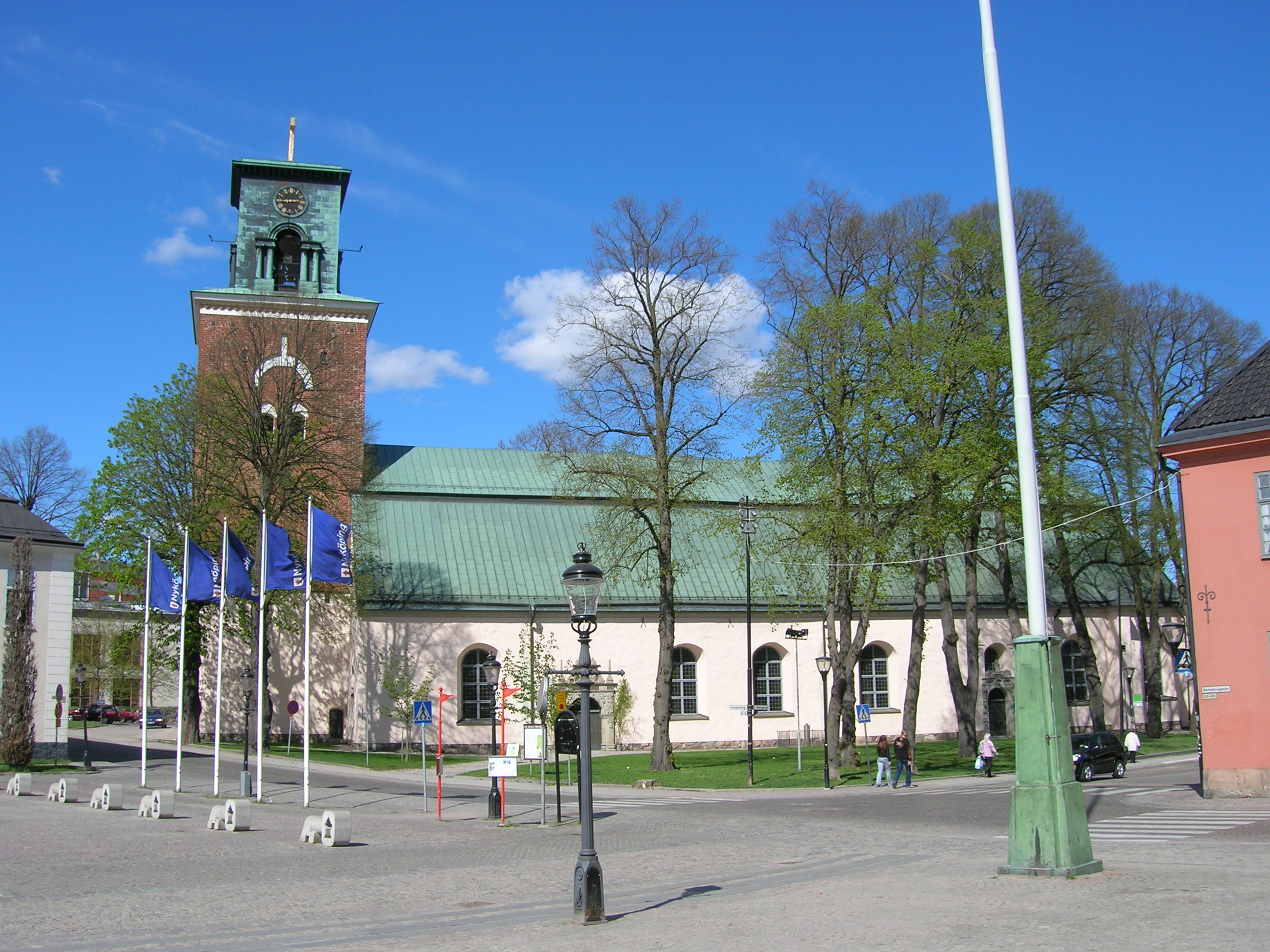 Sankt Nicolai kyrka i Nyköping, sedd från Stora torget